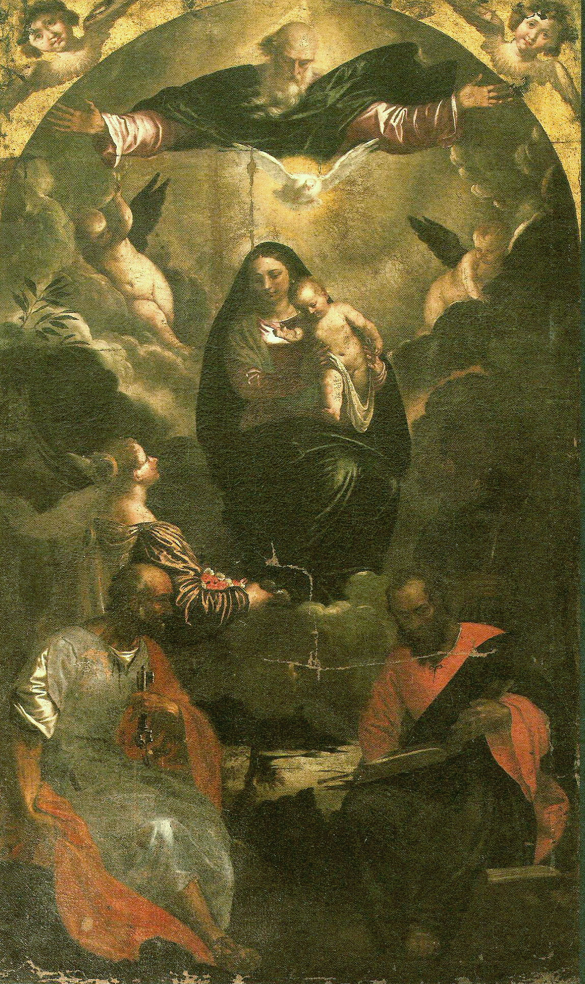 Madonna con Bambino e santi di Paolo Veronese (1570 ca.) nel Santuario della Madonna dello Splendore a Giulianova.